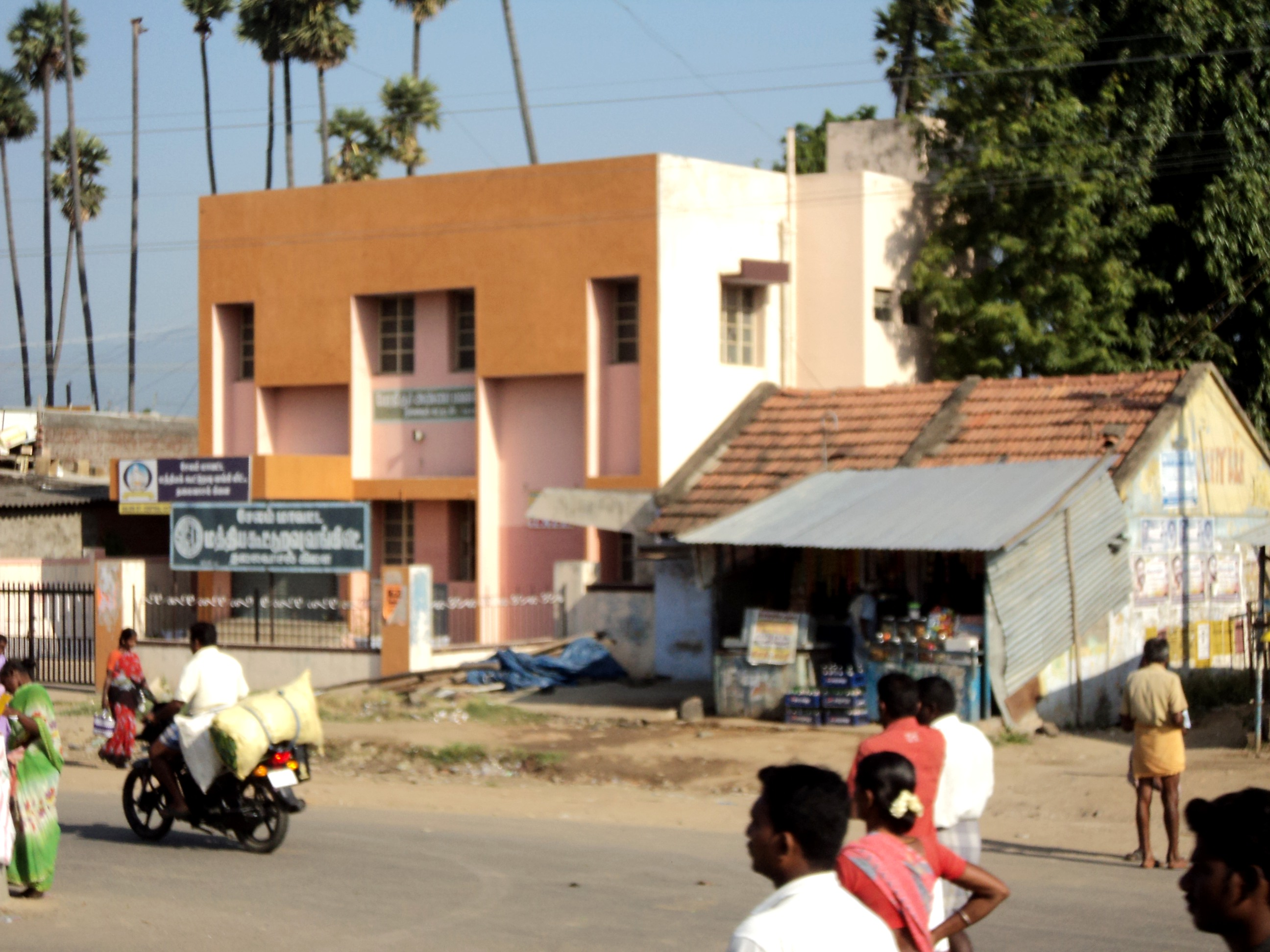 தலைவாசல் கூட்டுறவு வங்கி